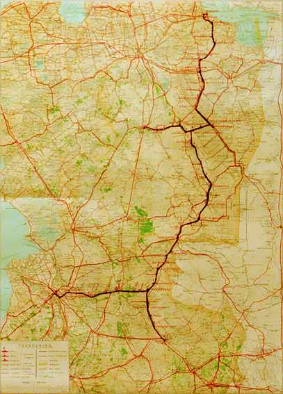 Kaart van de lijnen van de NOLS, onderdeel van zelf gemaakte foto van oude poster door de NOLS zelf uitgegeven en door een vriend van uploader ingescand en bewerkt voor Wikipedia. PD door ouderdom.